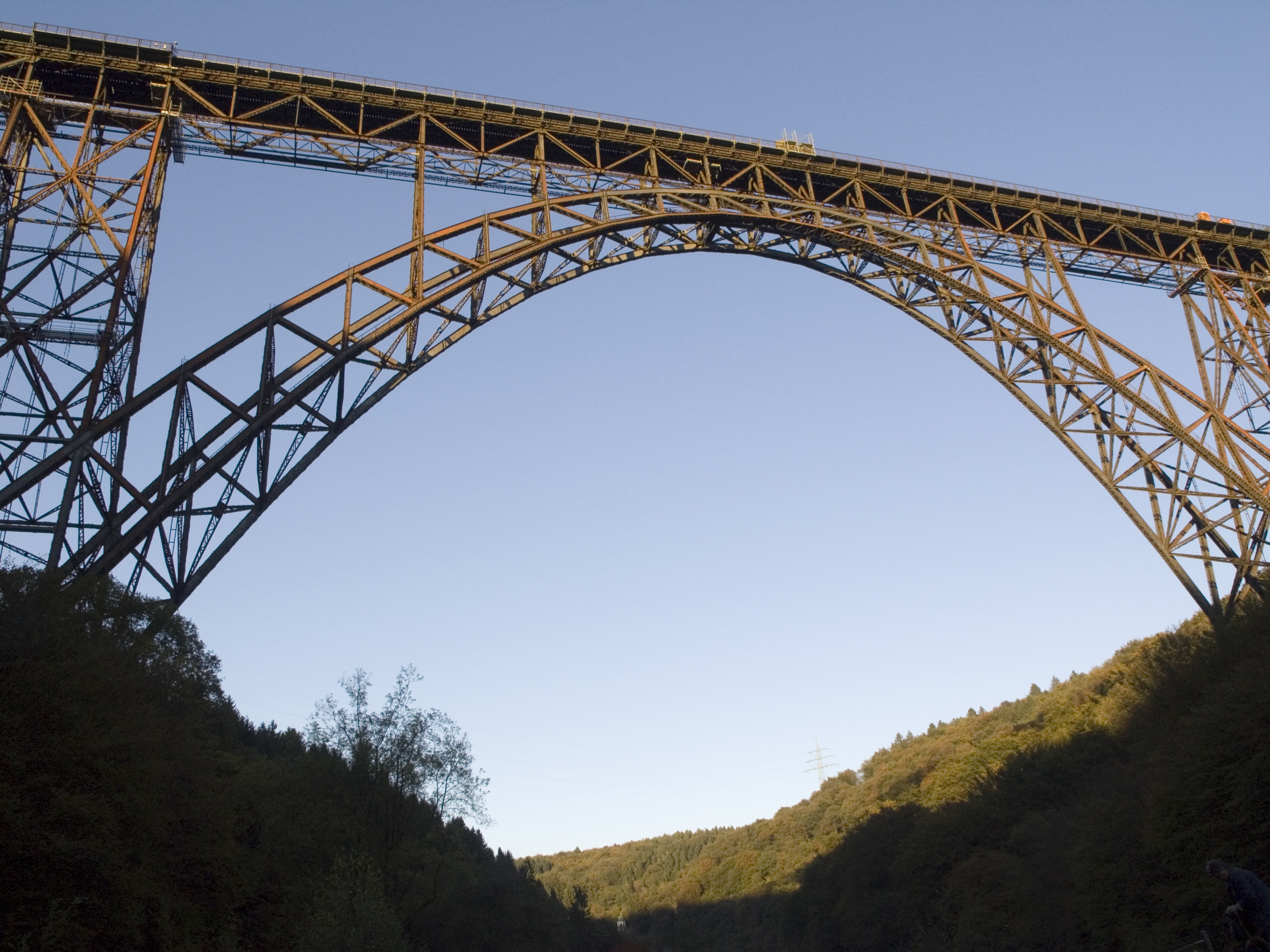 Северный Рейн - Вестфалия, Золинген - Мост Mungstener